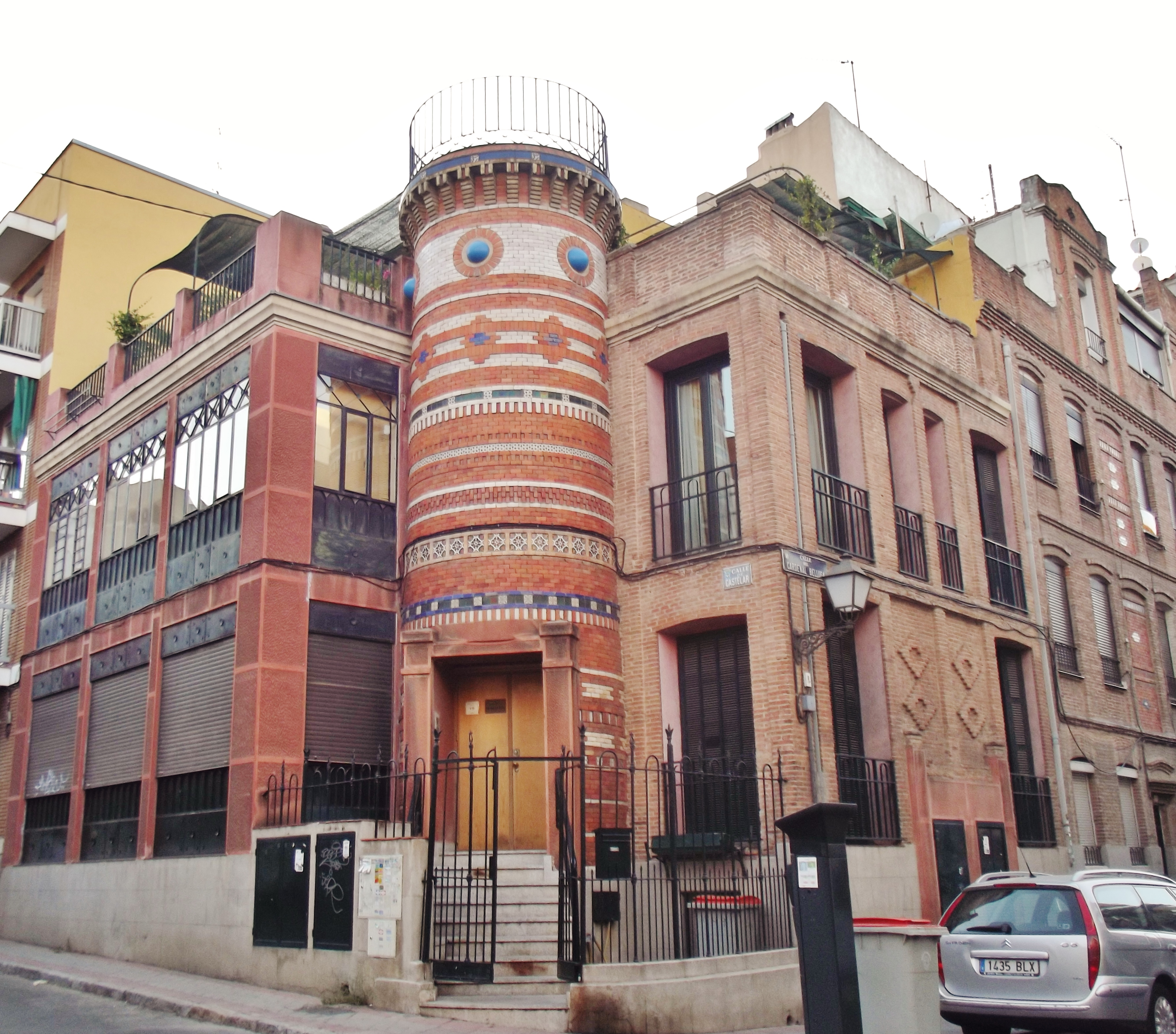 Sede Social de la Asociación S.U.F.I. (Sociedad Para La Unidad Fundamental Del Individuo), calle de Castelar con Cardenal Belluga, Madrid, España.